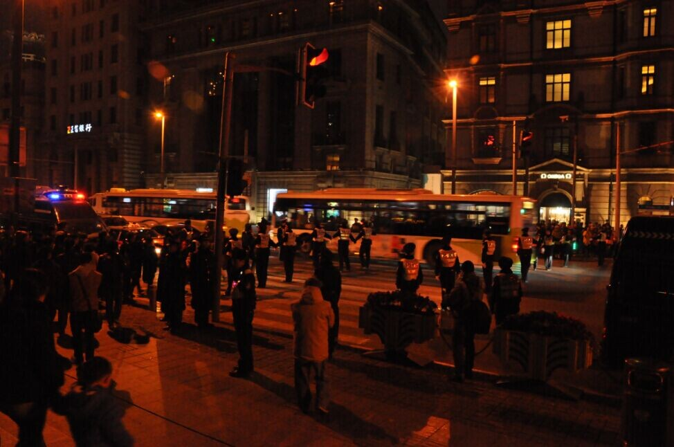 1月2日晚的外滩街景